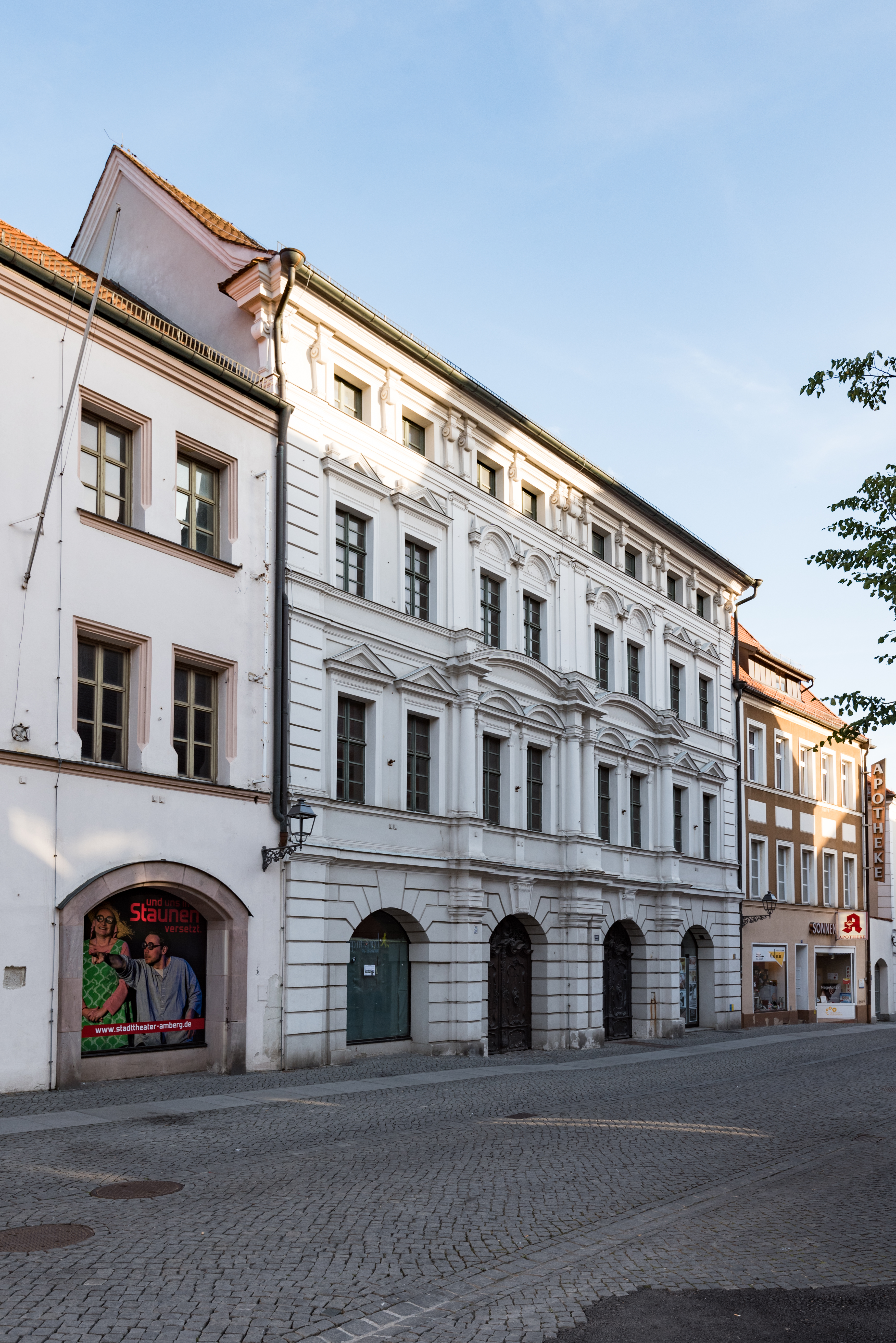 Amberg, Bahnhofstraße 10